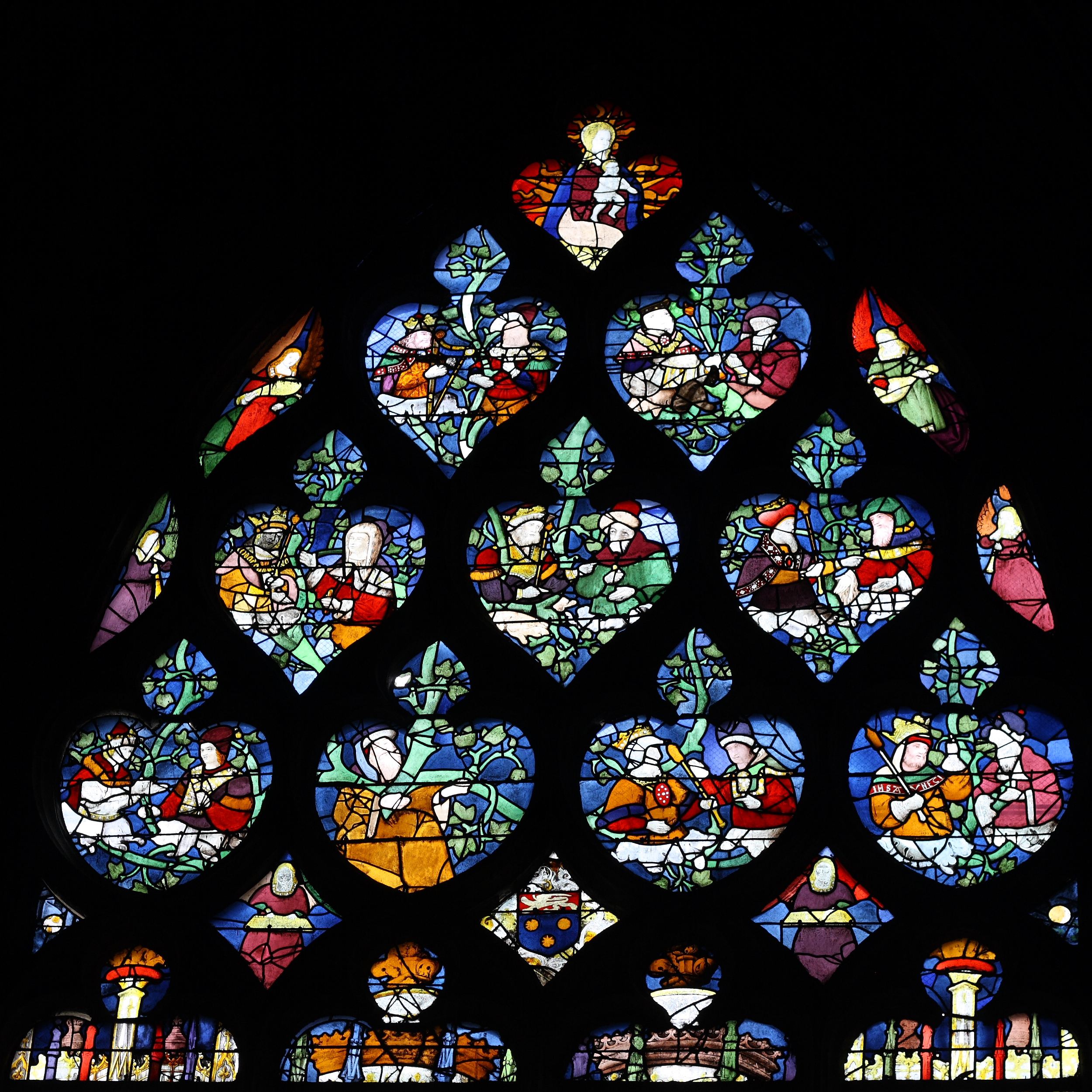 Basilika Saint-Michel in Bordeaux, Bleiglasfenster mit der Darstellung der Wurzel Jesse